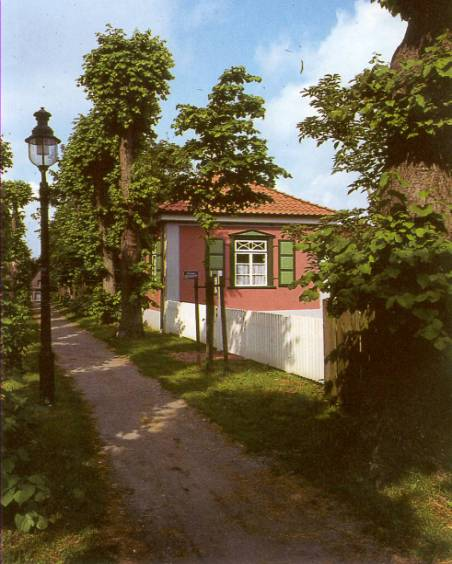 Gartenhaus in Otterndorf in dem der Stadtschreiber wohnt